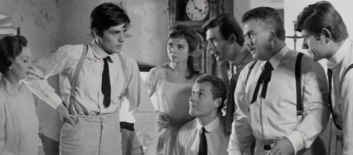 Screenshot di Che gioia vivere film René Clément (1961).